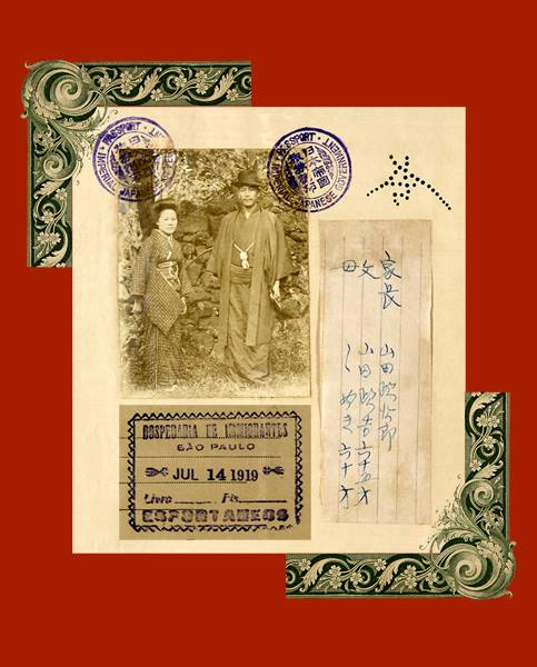 Série Interior – Naturalização.